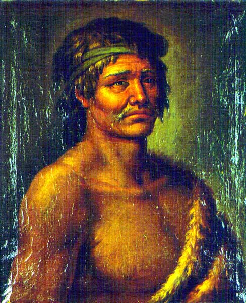 Copia fiel de unos apuntes tomados para el retrato del cacique Junchar por José del Pozo en Puerto Deseado, en 1789, durante la expedición de Malaspina (1789-1794). Los apuntes a lápiz citados anteriormente se conservan en el Museo Naval con la signatura ms. 1725 (9). Representa el busto de un indio patagón, de frente, con pieles sobre el hombro izquierdo, cinta en el pelo, rubio, con bigote y ojos claros. Ingresó en el Museo en 1932, con los fondos del Depósito Hidrográfico.